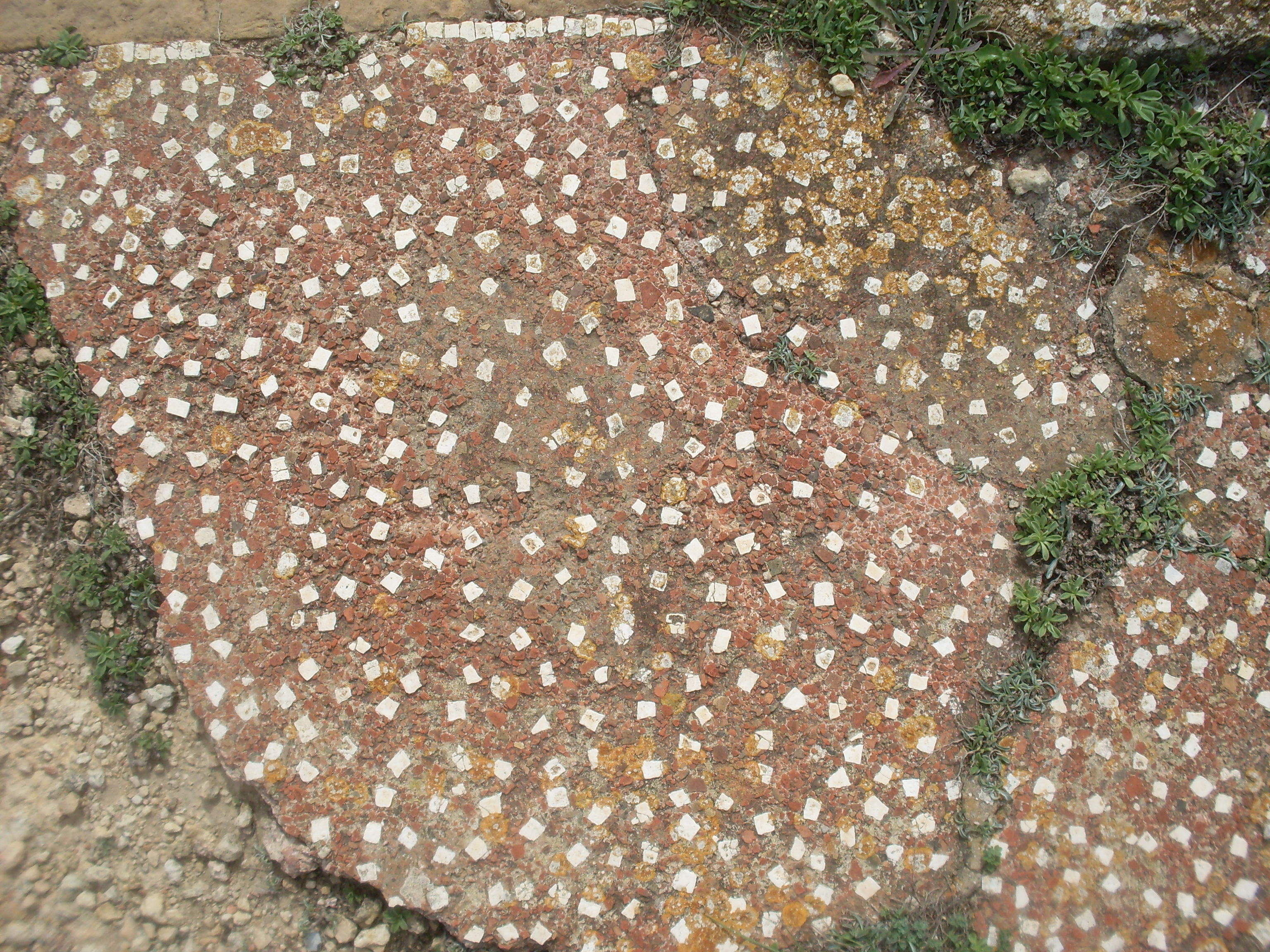 Pavement en opus signinum